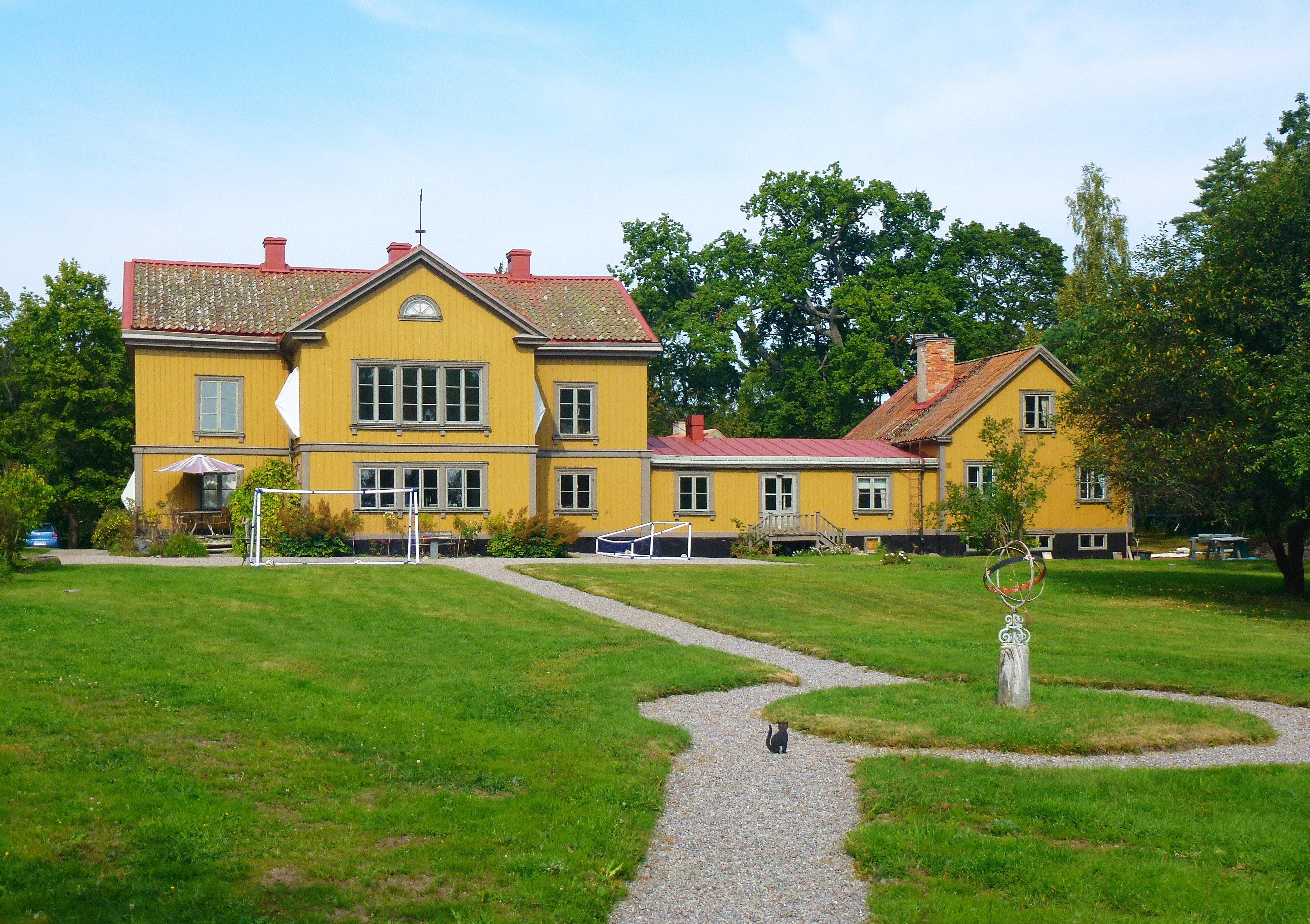 Kils gård, huvudbyggnad från söder